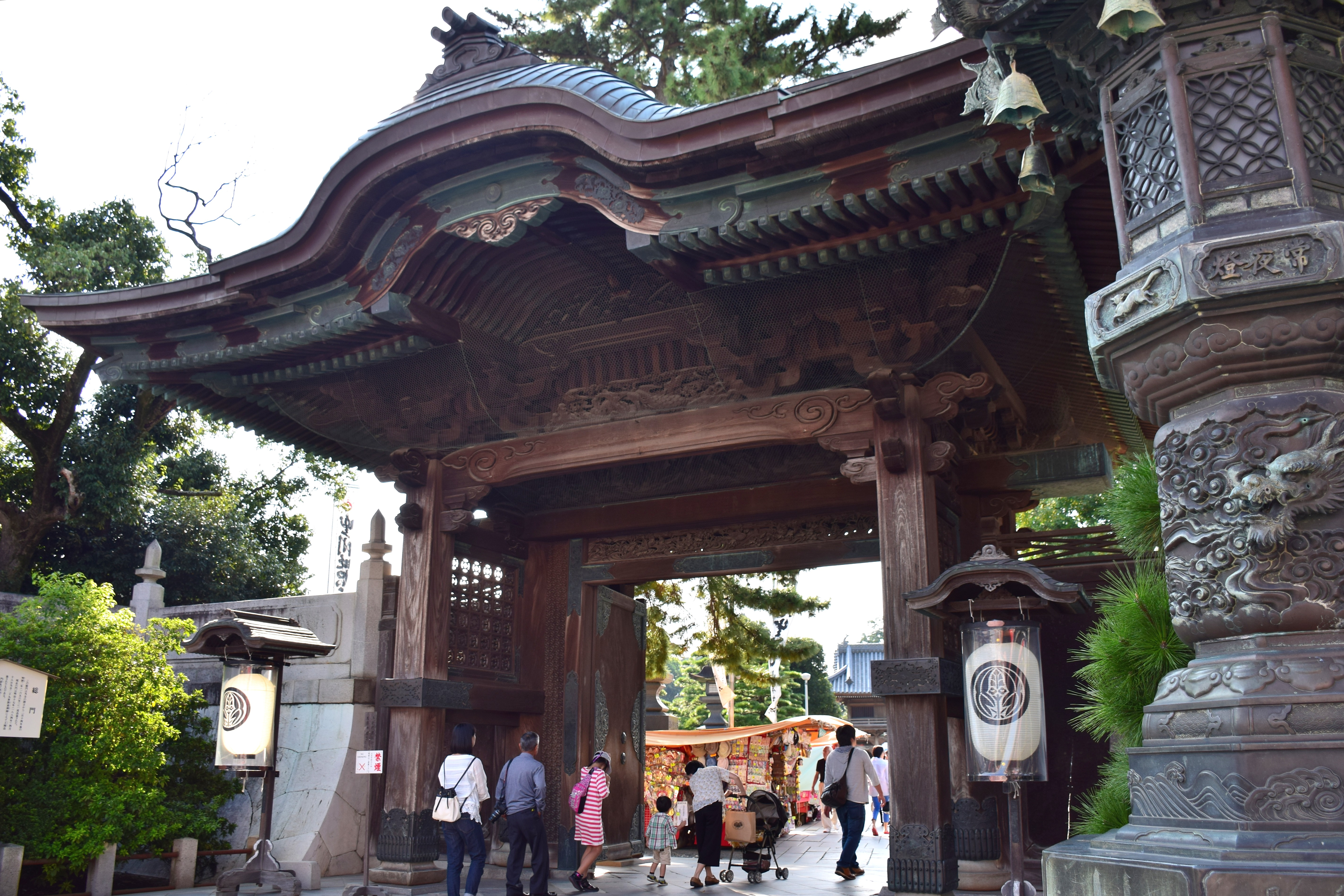 豊川稲荷総門